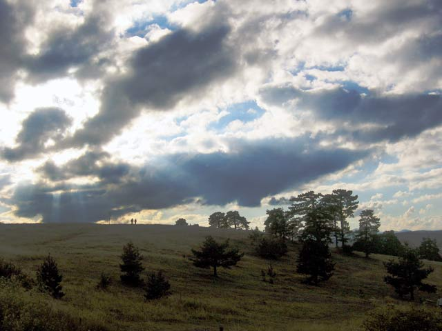 Description:Природне лепоте Златибора author: Snezana Trifunovic Source: self-made